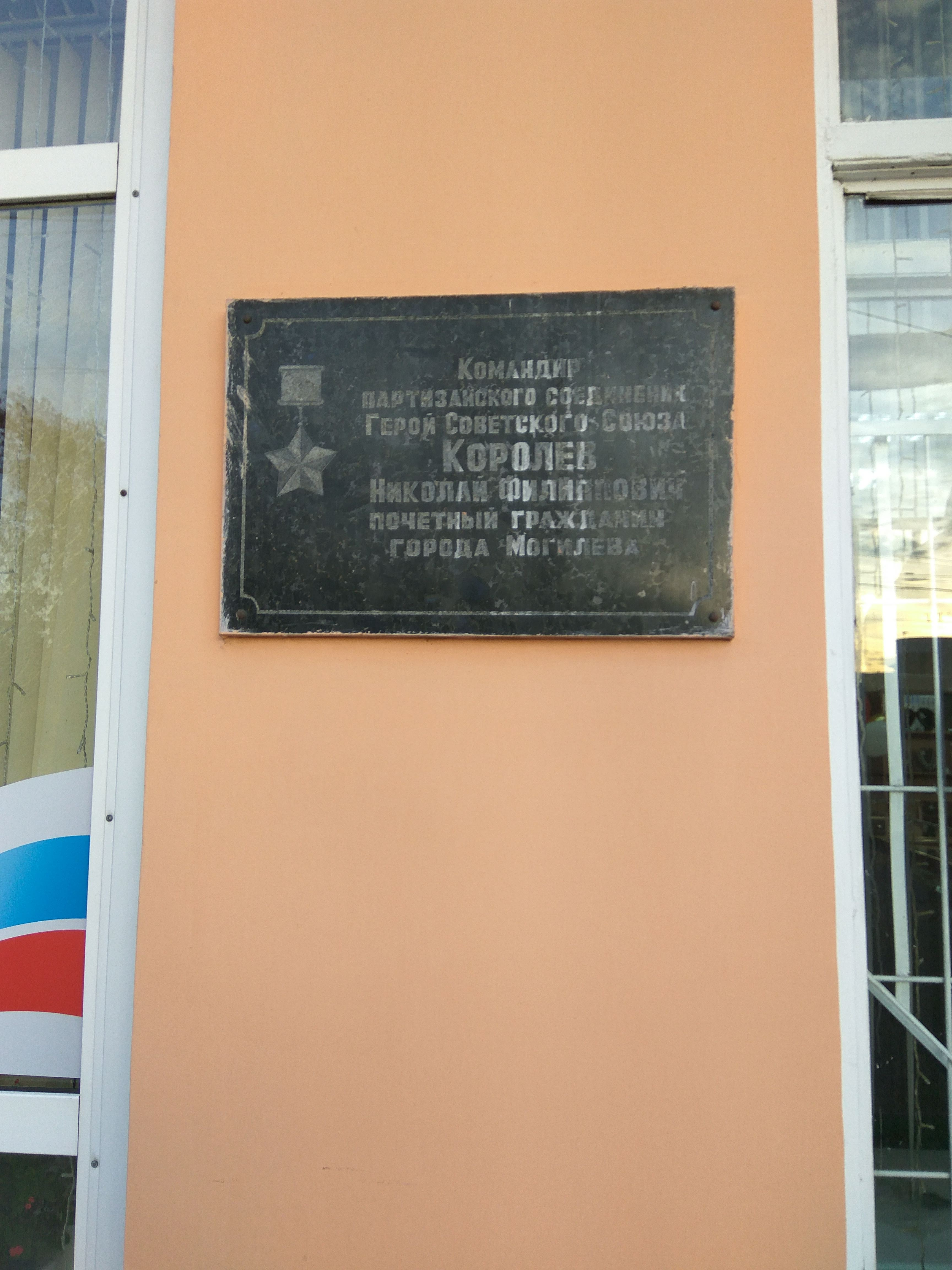 Магілёў. Дошка Каралёву